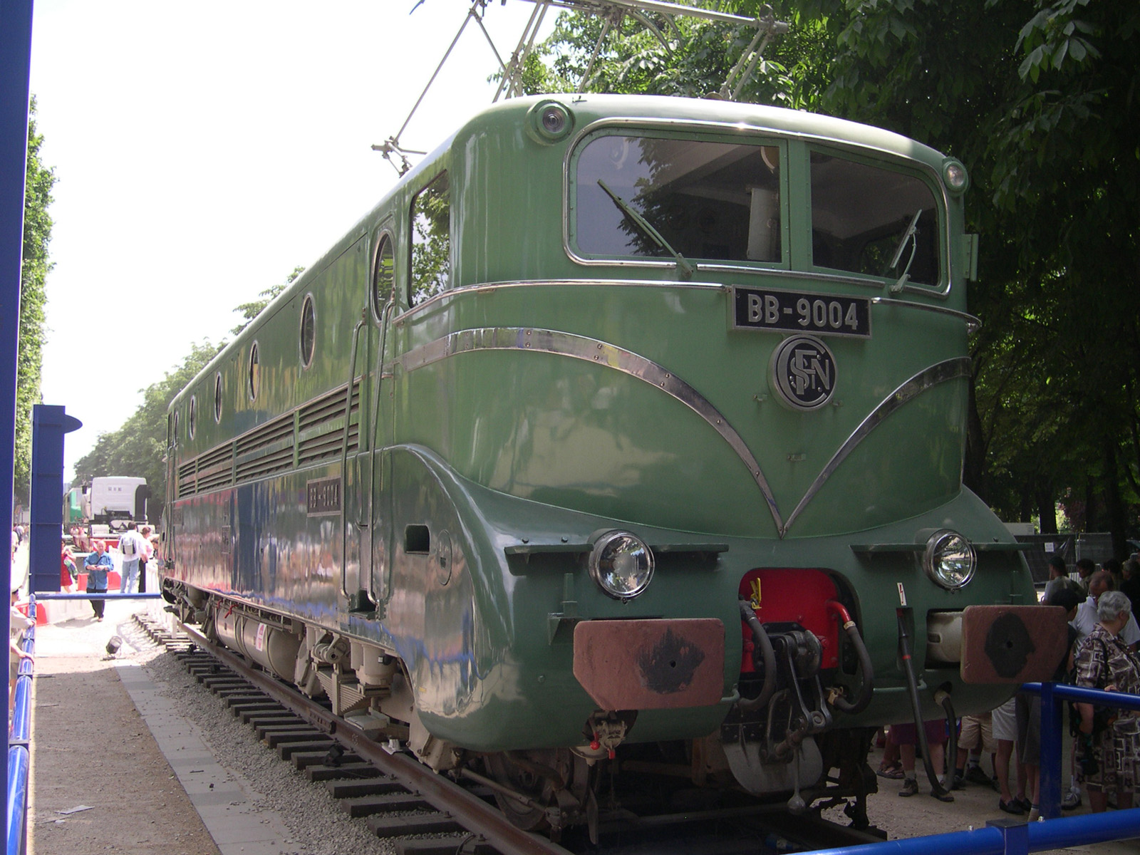 Expo Train capitale 2003 Locomotive BB9004 Catégorie:Matériel roulant de la SNCF